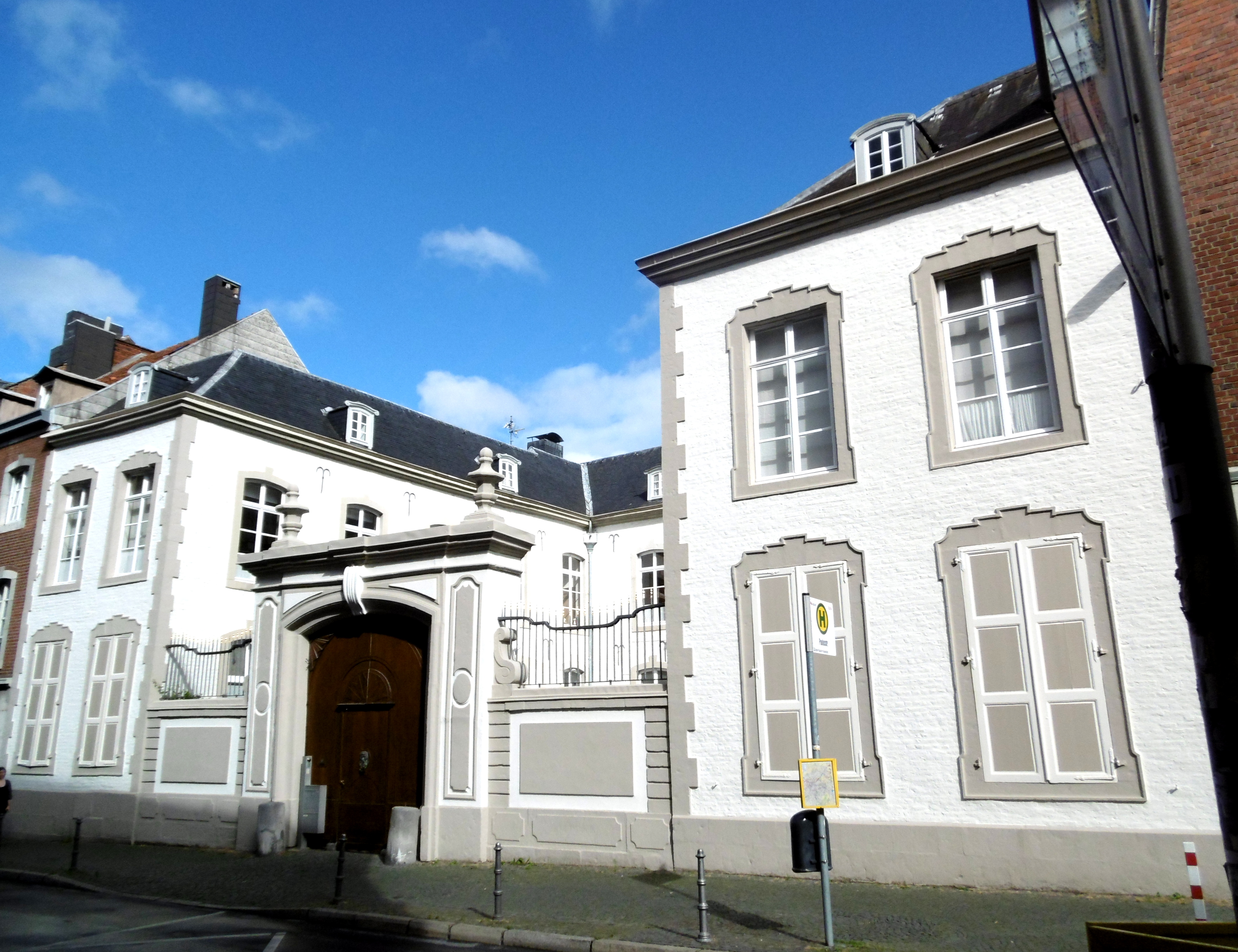 Wylresches Haus in Aachen